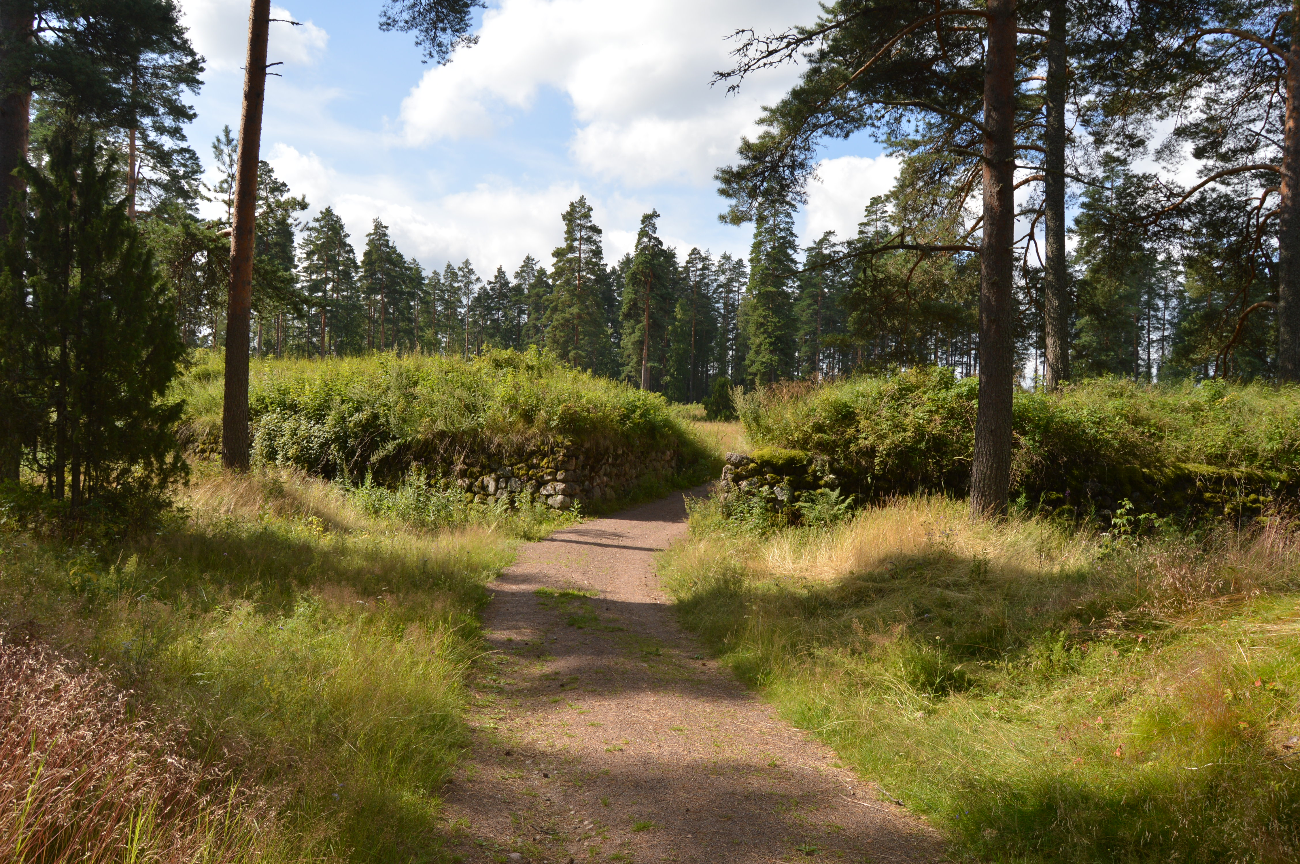 Utin linnoitus